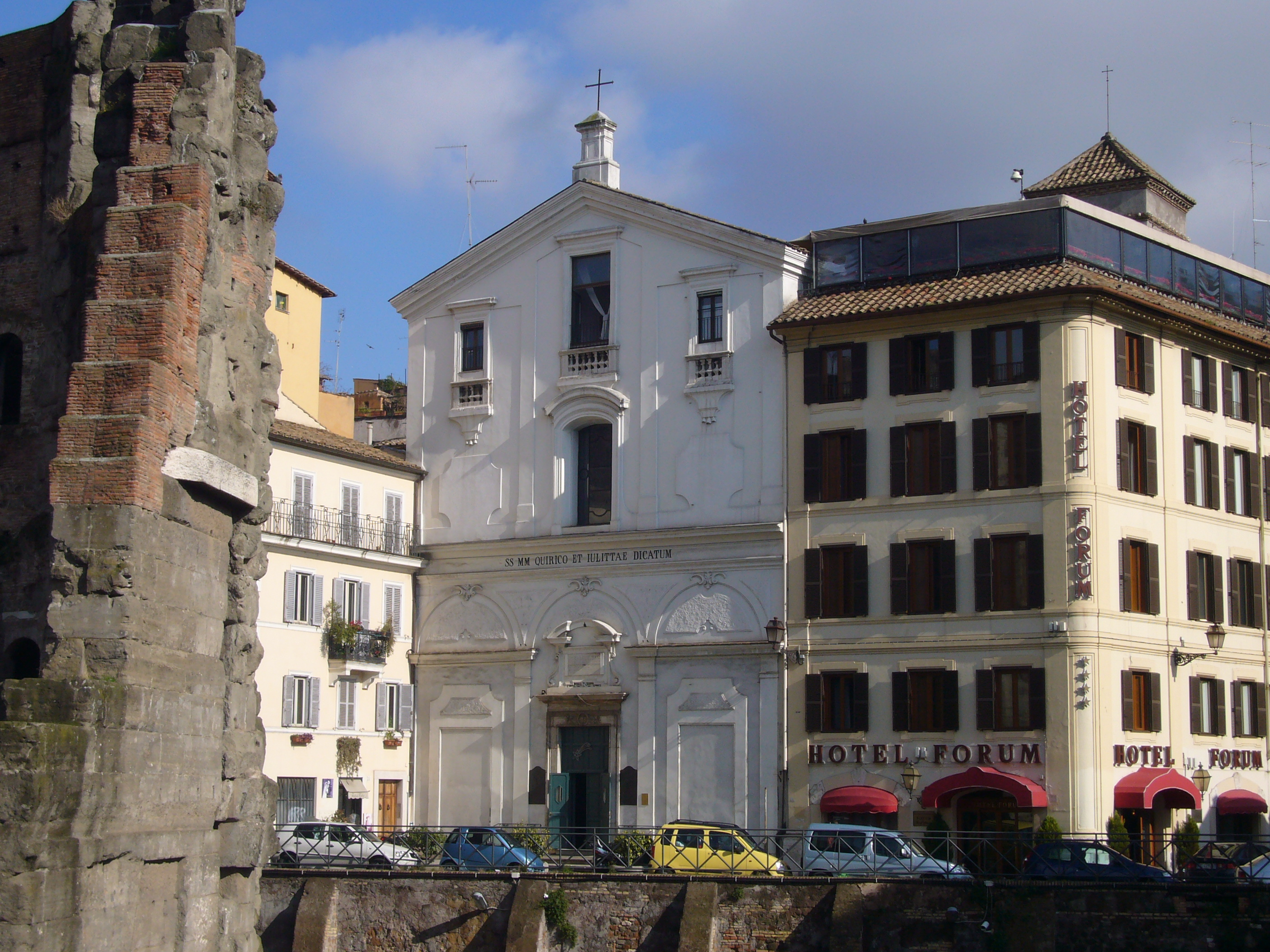 Roma, Monti, santi Quirico e Giulitta al Foro di Augusto